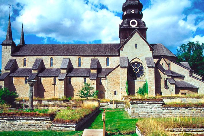 Varnhem klosterkyrka Image taken by Wigulf